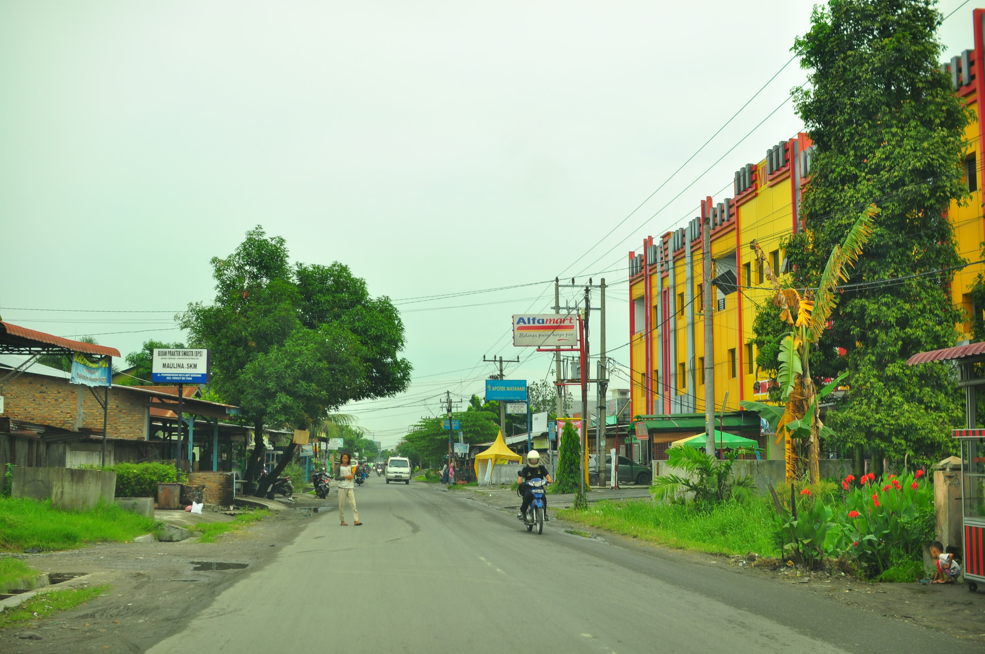 mini market